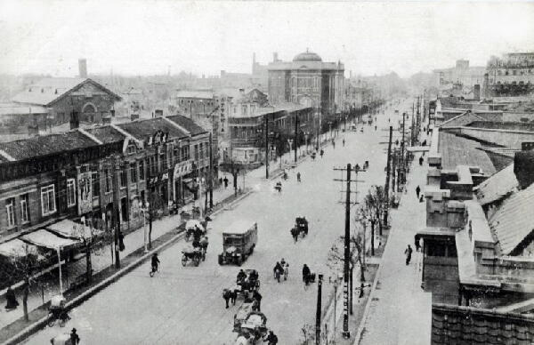 整然とした町並みです。 歩道は四角いブロックを敷き詰めたつくりです。 バスが走っているのが見えます（アメリカ製車体のバスの様です）。